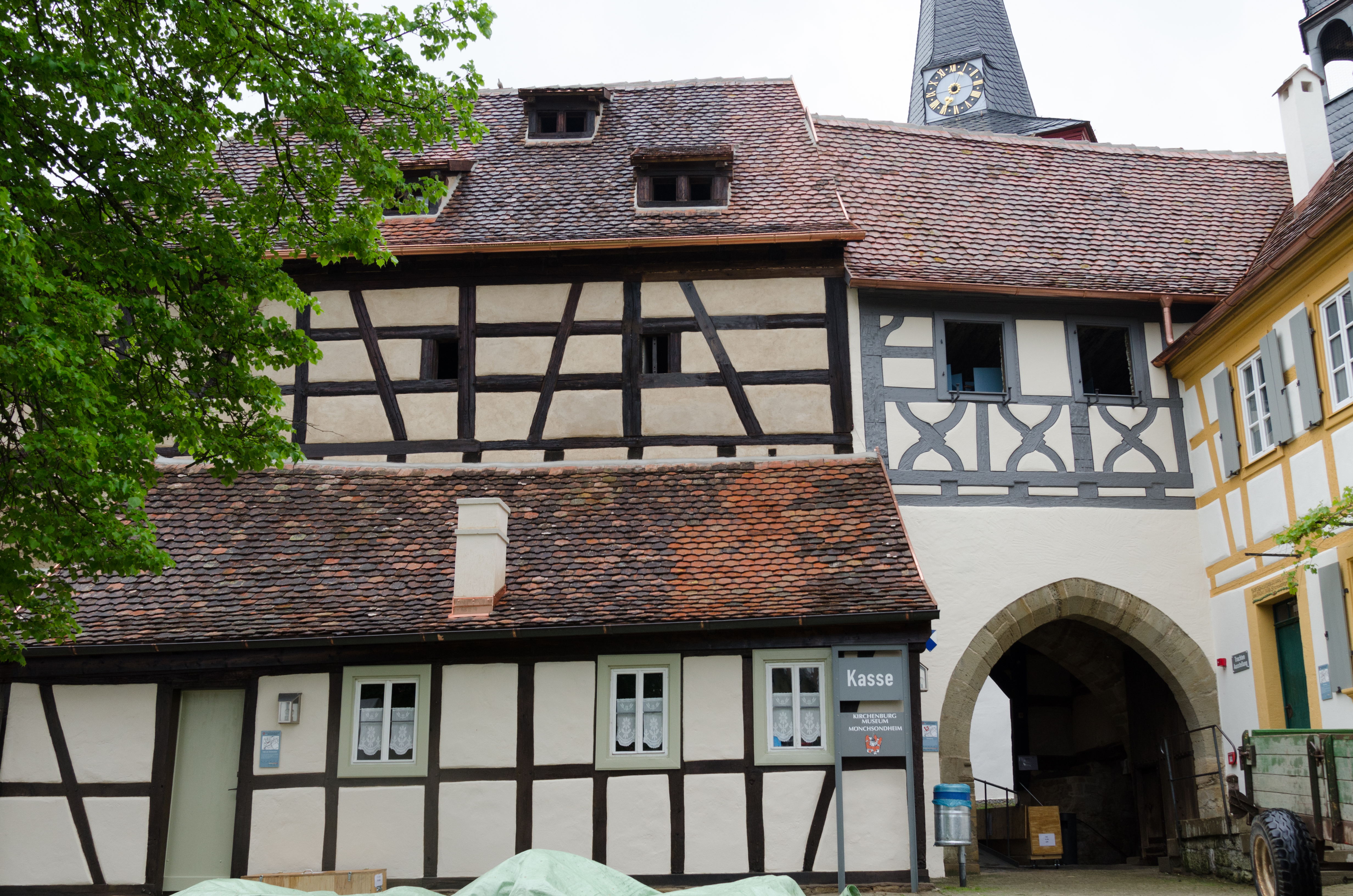 Iphofen, Mönchsondheim, Kirchenburg